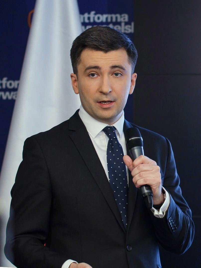 Andrzej Rzońca, ekonomista.